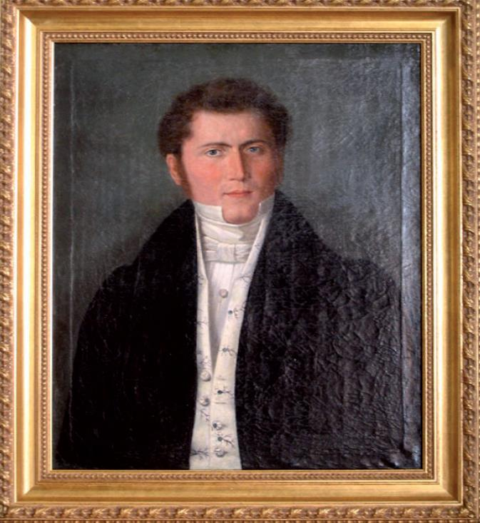 Portrait de Jean-Baptiste Vercin par Joseph Antoine Chatron